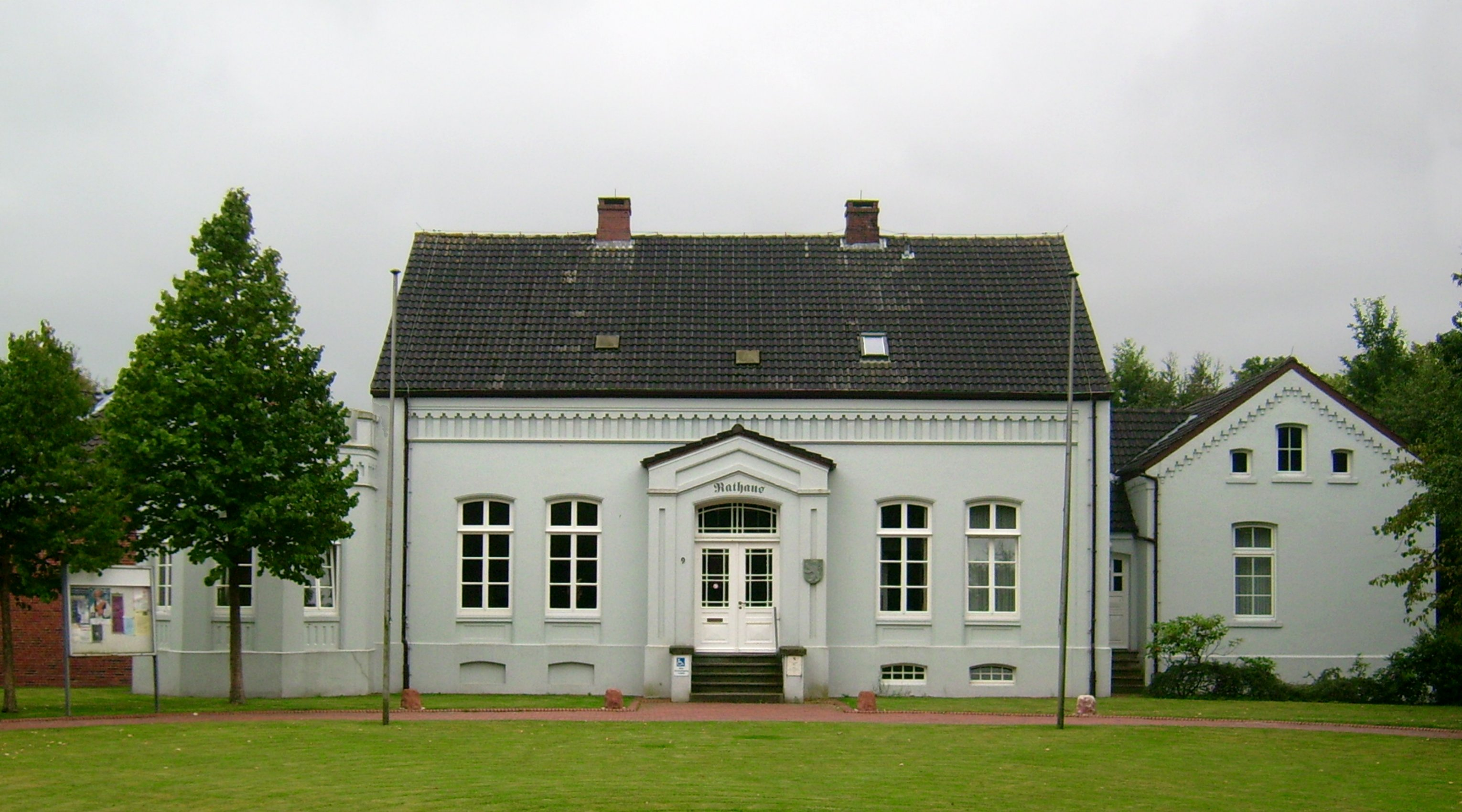 Rathaus in Dornum